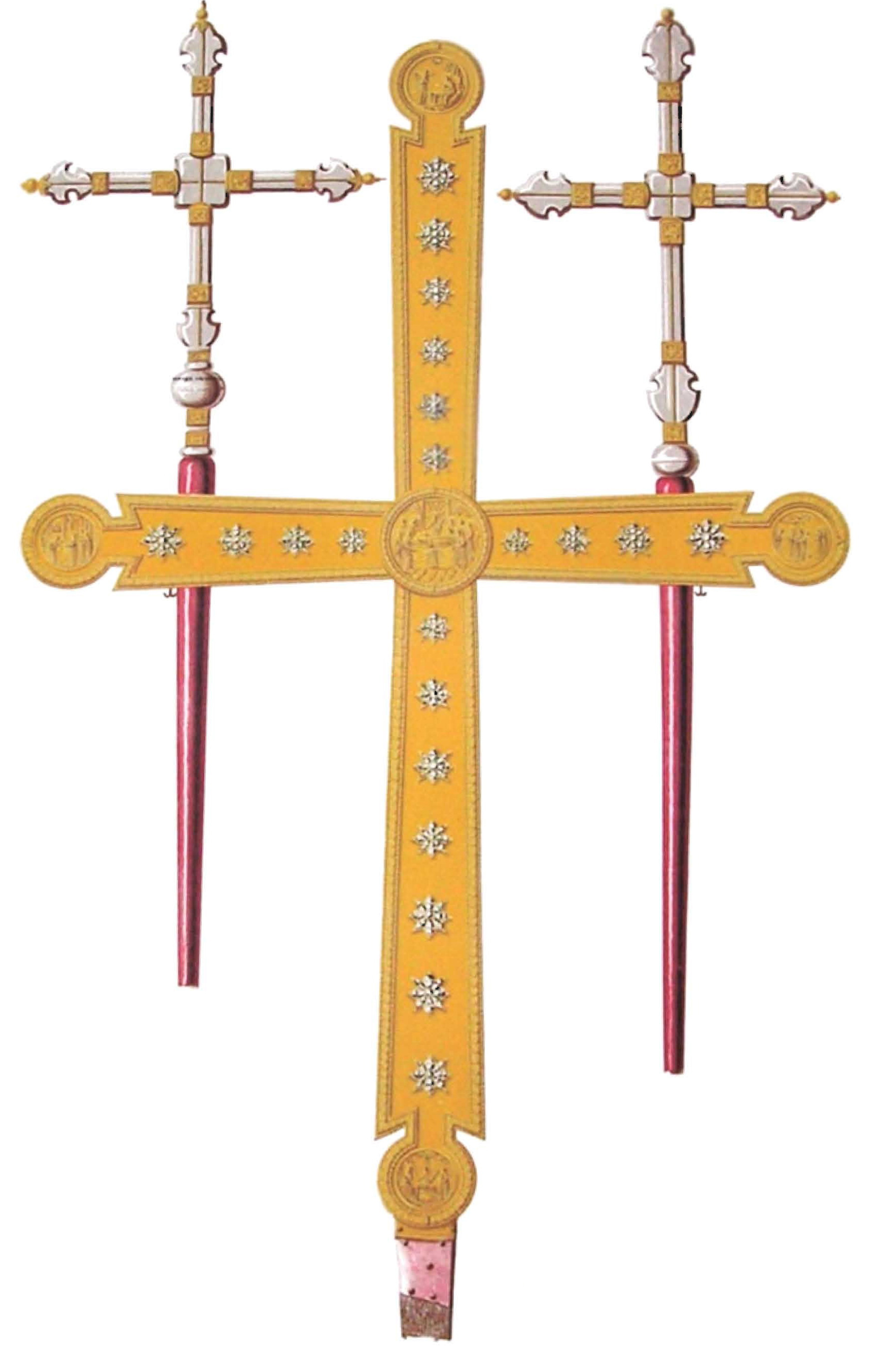 Древности Российского государства (Antiquities of Russian country), 1846—1853. Т.1. Иллюстратор — Солнцев, Фёдор Григорьевич Старинные Корсунские кресты и звездица Антония Римлянина Корсунскими крестами называются запрестольные три креста в алтаре московского Успенского собора. Один из них, четырехконечный, обитый позолоченными серебряными листами; лицевая сторона усеяна самоцветными каменьями и клеймами с обронными изображениями разных святых. На середине и по концам в кругах наведены финифтью: Распятие, Деисус, Благовещение и Воскресение. На обратной стороне поле украшено звездами из хрусталей; на середине и на концах в клеймах чеканные изображения господских праздников. В переписных книгах московского Успенского собора, скрепленных в 1627 г. Симоновским архимандритом Иосифом, впоследствии патриархом, об этом памятнике благочестия сказано: «За престолом же крест большой Корсунский обложен серебром, в пяти местех писаны господские праздники мусиею на золотых цках; в нем же в гнездех сто семь хрусталей». Другие два креста, четырехконечные, из горного хрусталя, скрепленные серебром; они утверждены на древках для ношения в крестных ходах. На этих священных памятниках нет надписей, кои бы свидетельствовали нам об их местности и древности, но предание гласит, что они перенесены просветителем России Владимиром I в столичный град Киев из покоренной им Корсуни, оттуда перешли во Владимир и потом в Москву. О первом кресте свидетельствует книга Жезл (1655 г.), что он «предрагоценный окладом, неоцененный образом, древностью пречестный, именуемый Корсунский, алтарь Господень яко солнце просвещает в соборном храме, в матери всех церквей». В 1812 г. святыни сии не были вывозимы из Москвы.